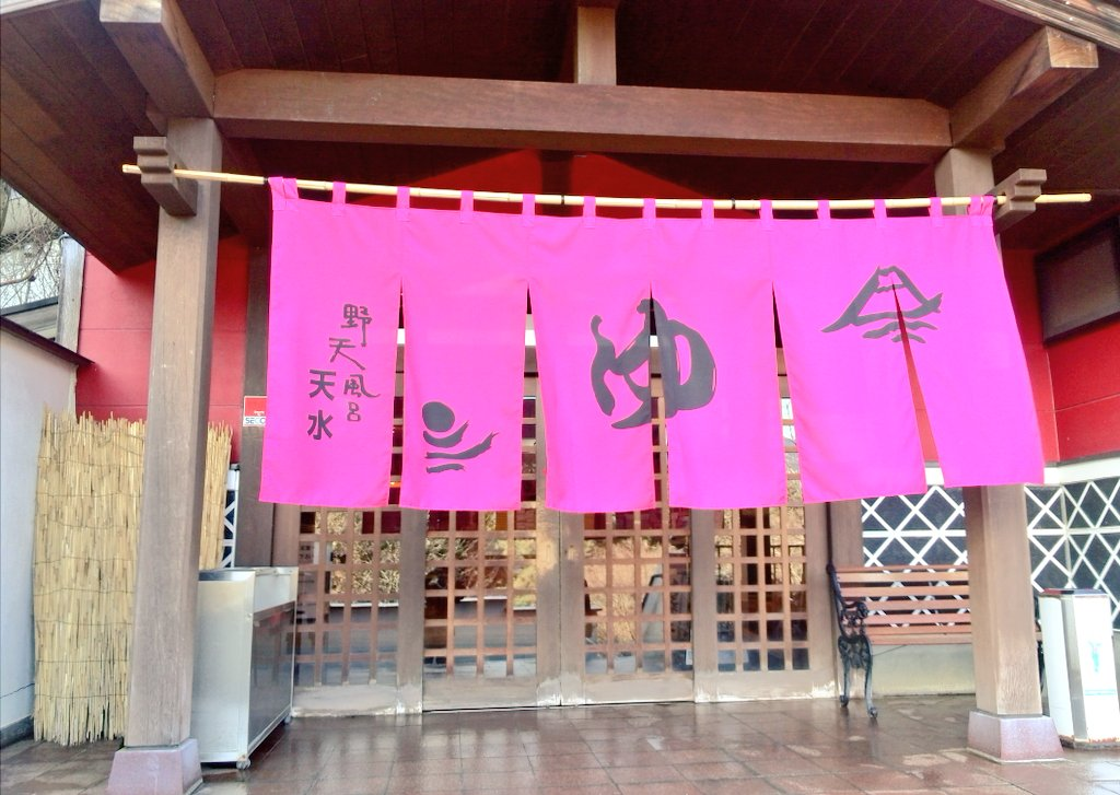 野天風呂天水